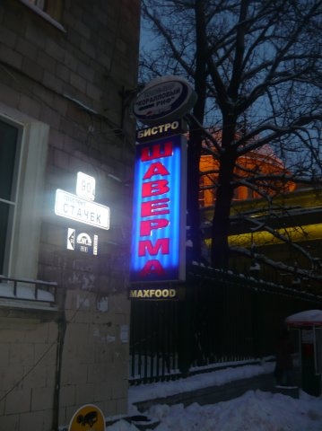 Вывеска "Шаверма" в Санкт-Петербурге на проспекте Стачек